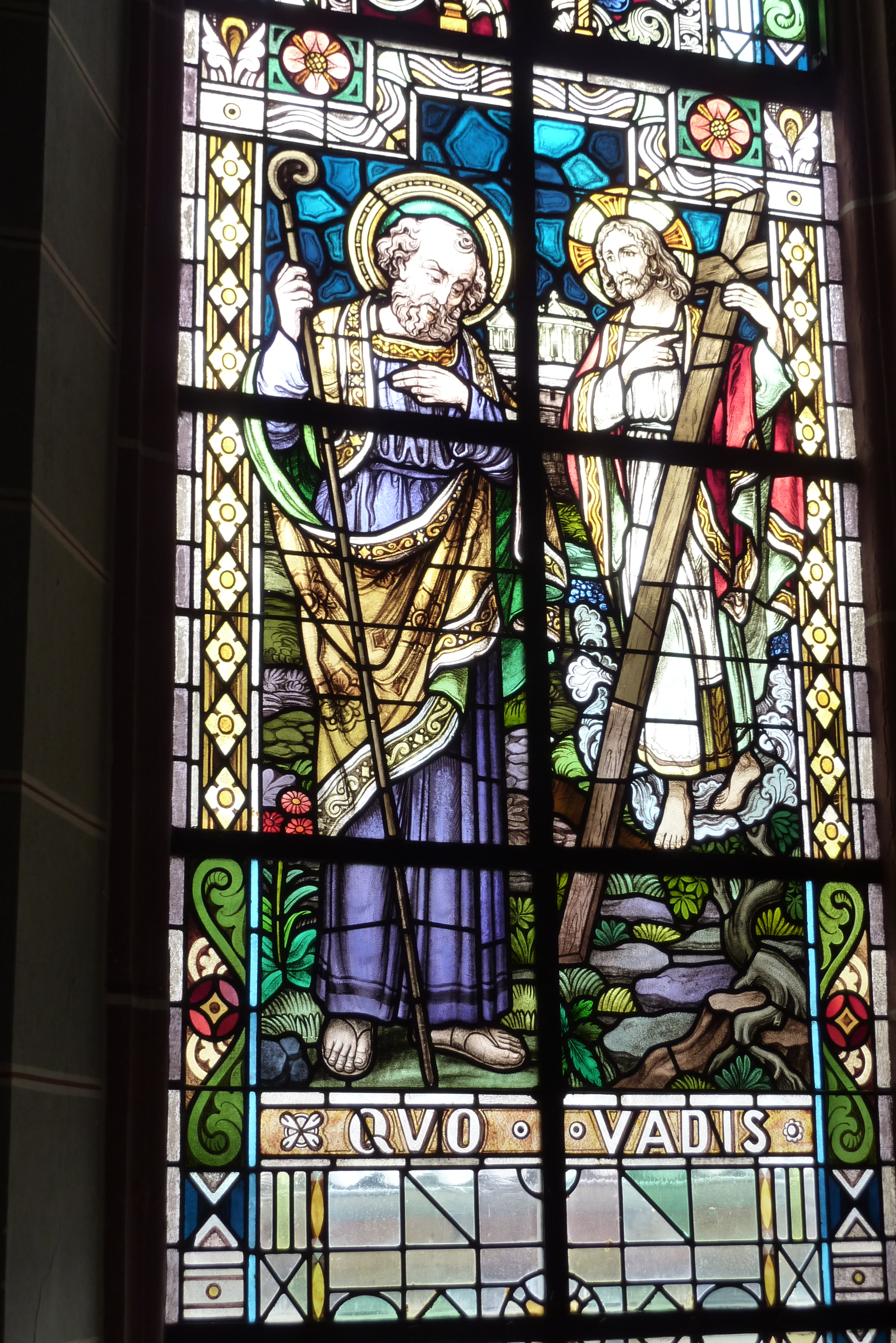 Bleiglasfenster in der katholischen Pfarrkirche St. Peter in Westum, Darstellung: Quo vadis?